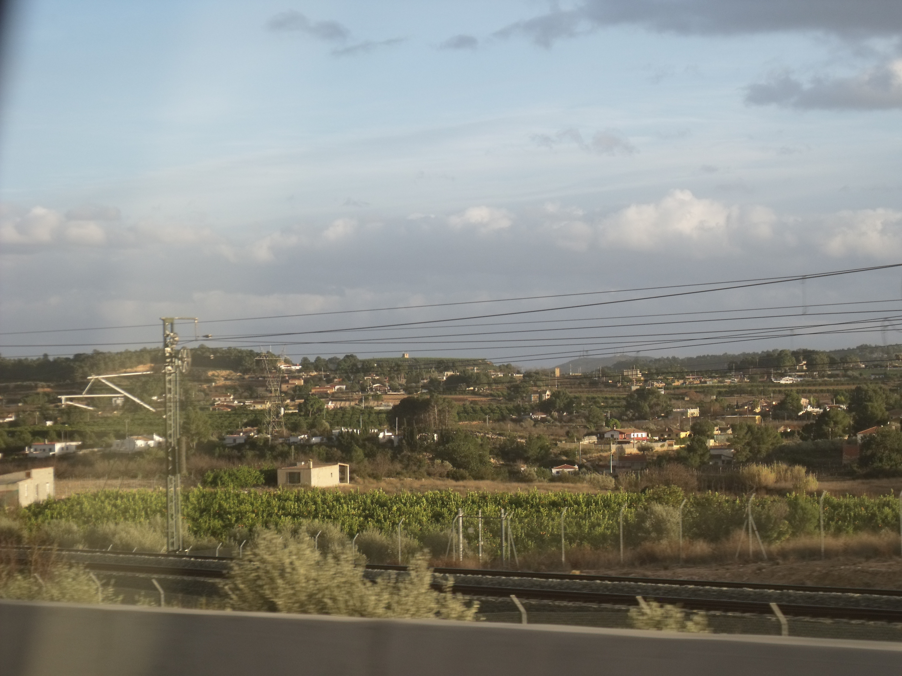 Vista general de la torre de telegrafía de Chiva